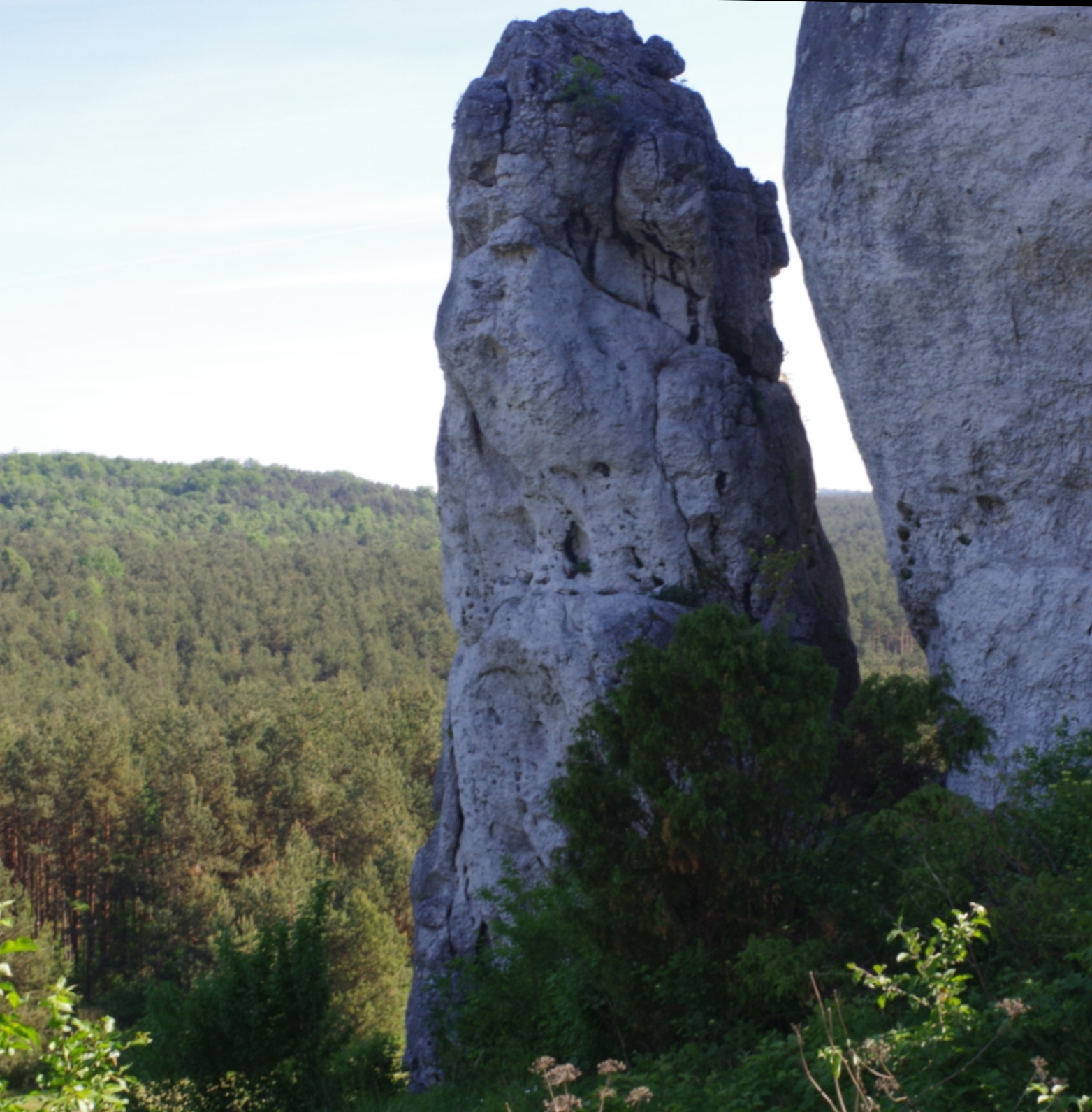 Skała Mniszek w grupie Mirowskich Skał. Widok od zachodu